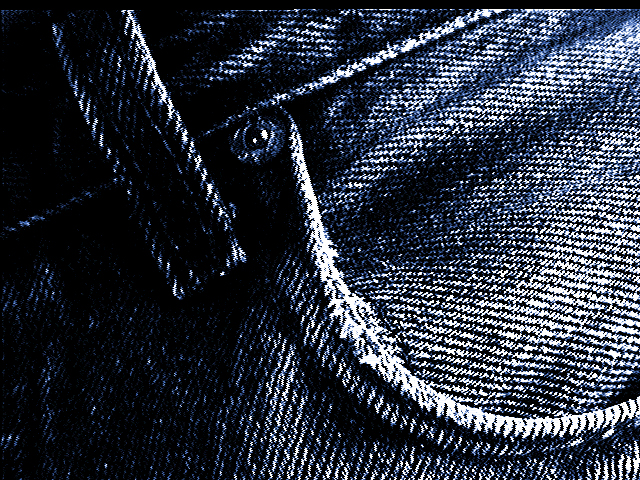 Blue jeans pocket and belt loop